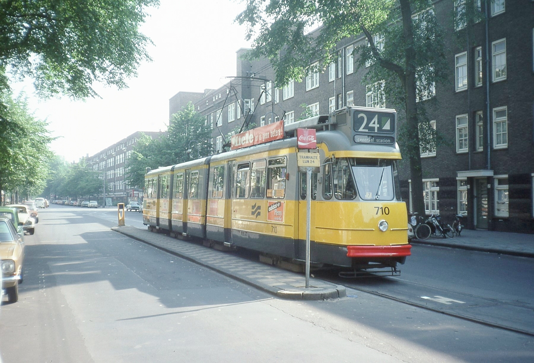 Photo. Trams aux Fils. Prise en juin 1976 Ligne 24 à Olympiaweg Tram 710